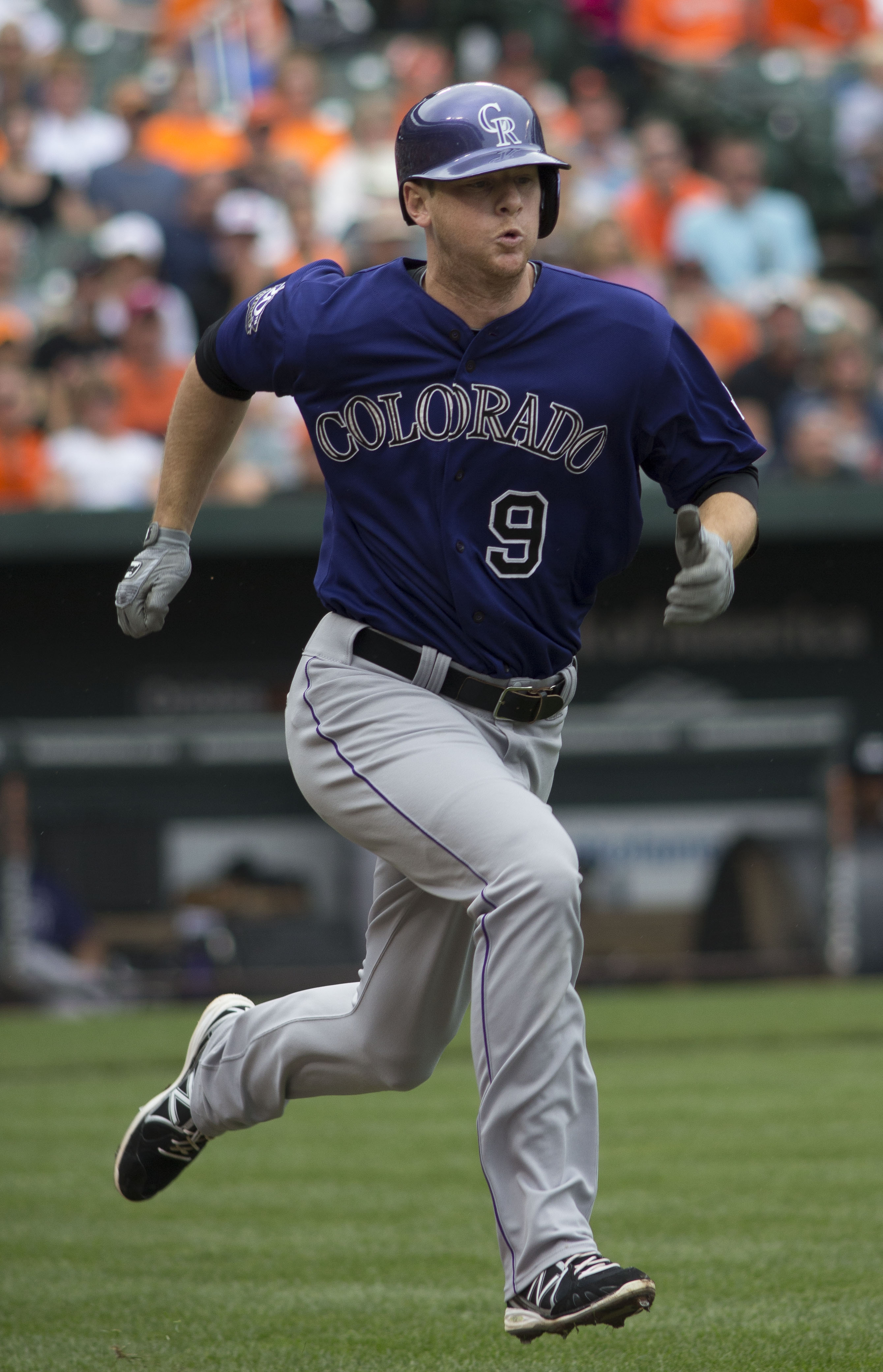 DJ LeMahieu